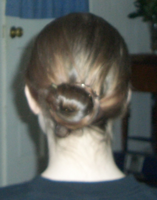 Bun